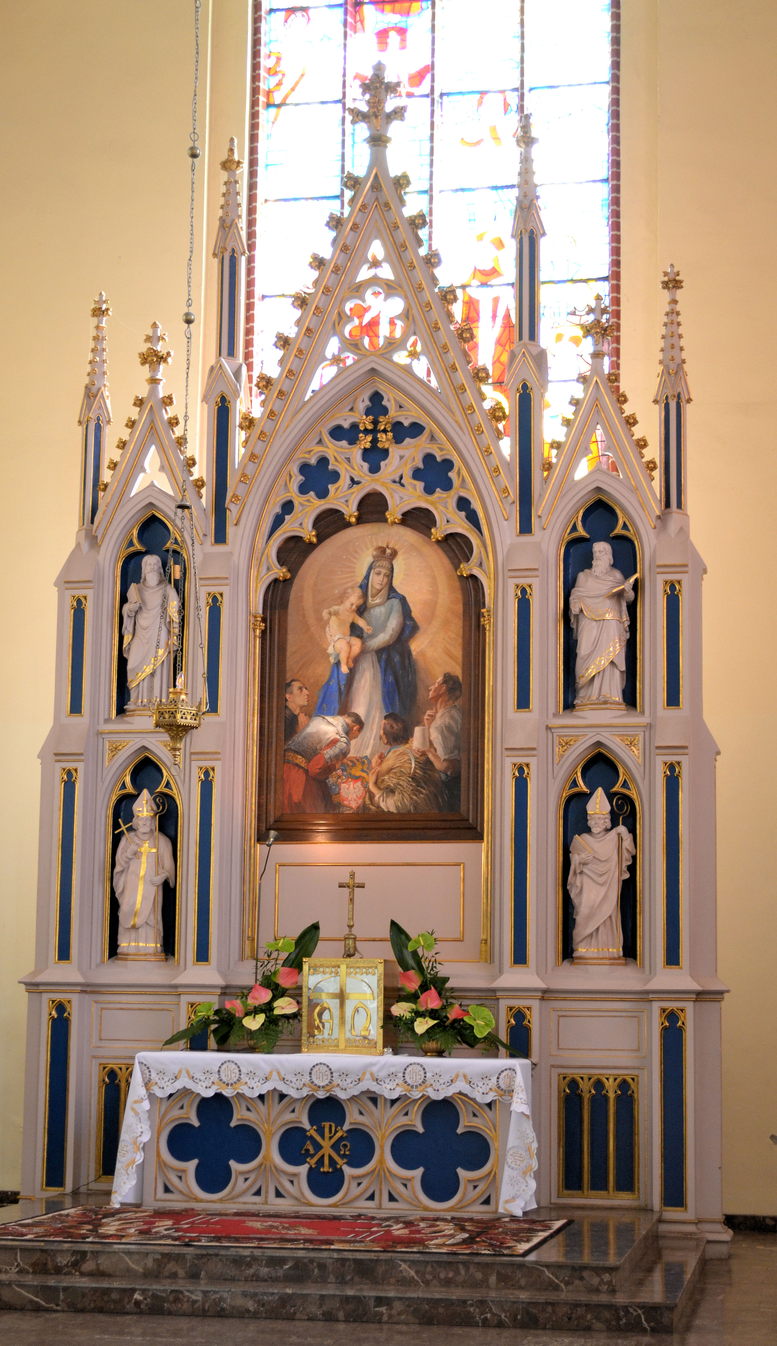 Kościół Narodzenia Najświętszej Maryi Panny w Gryfinie